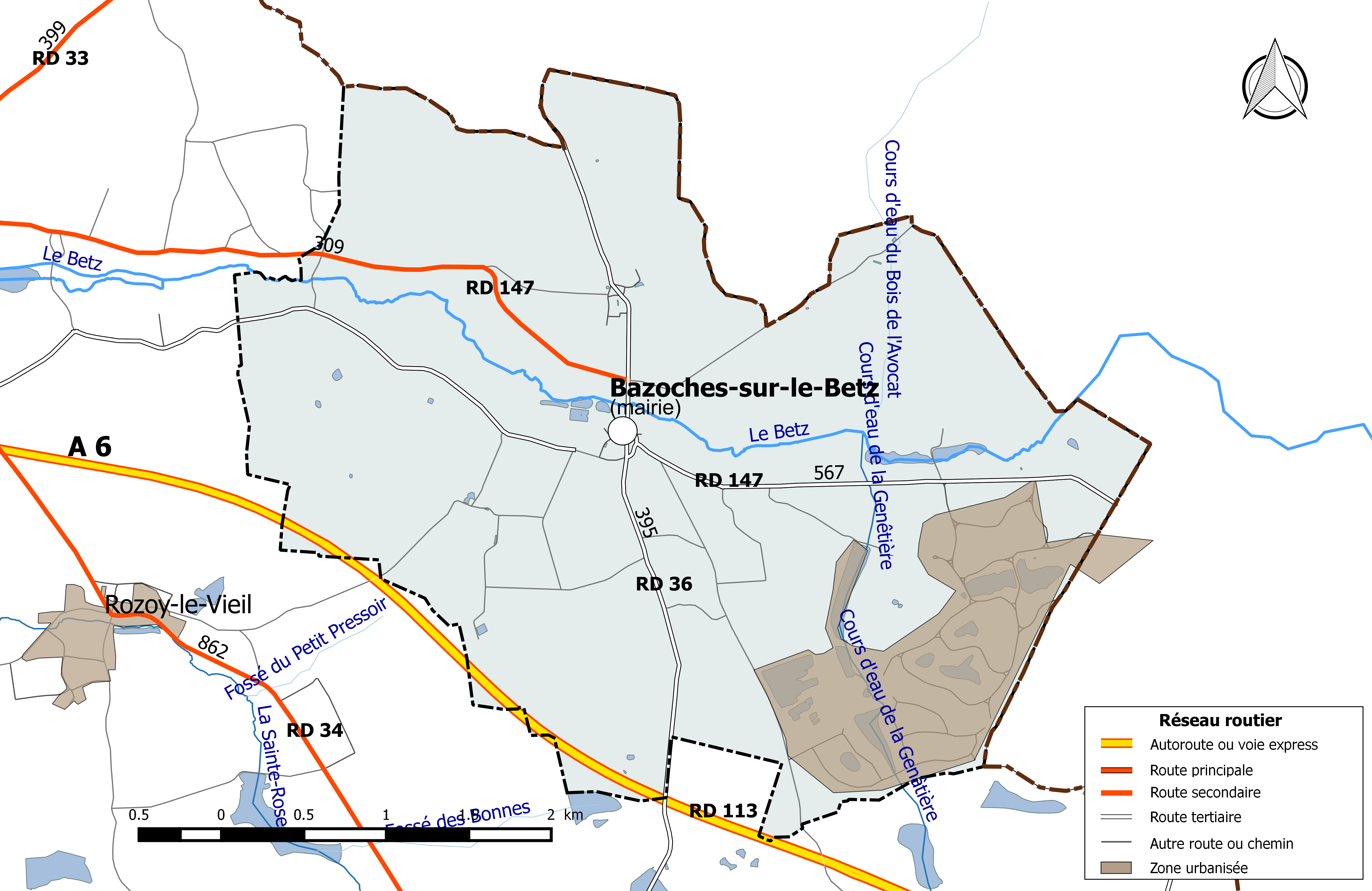 Carte du réseau routier de la commune de Bazoches-sur-le-Betz.